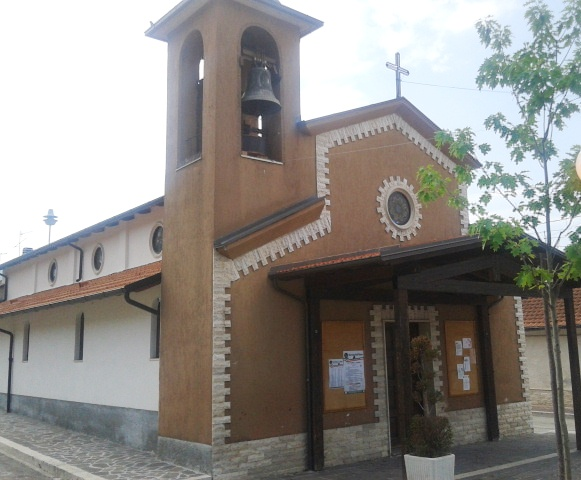 Chiesa della Madonna del Buon Consiglio a Casali d'Aschi